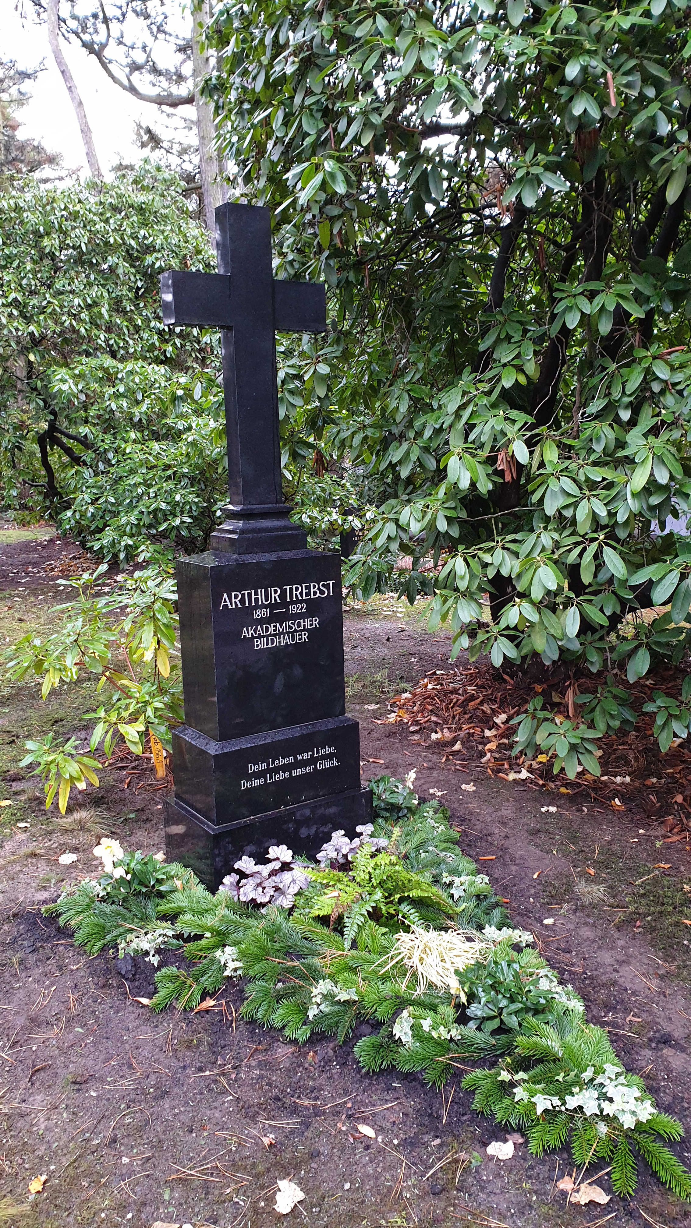 Grabmal Arthur Trebst auf dem Südfriedhof zu Leipzig XV. Abteilung